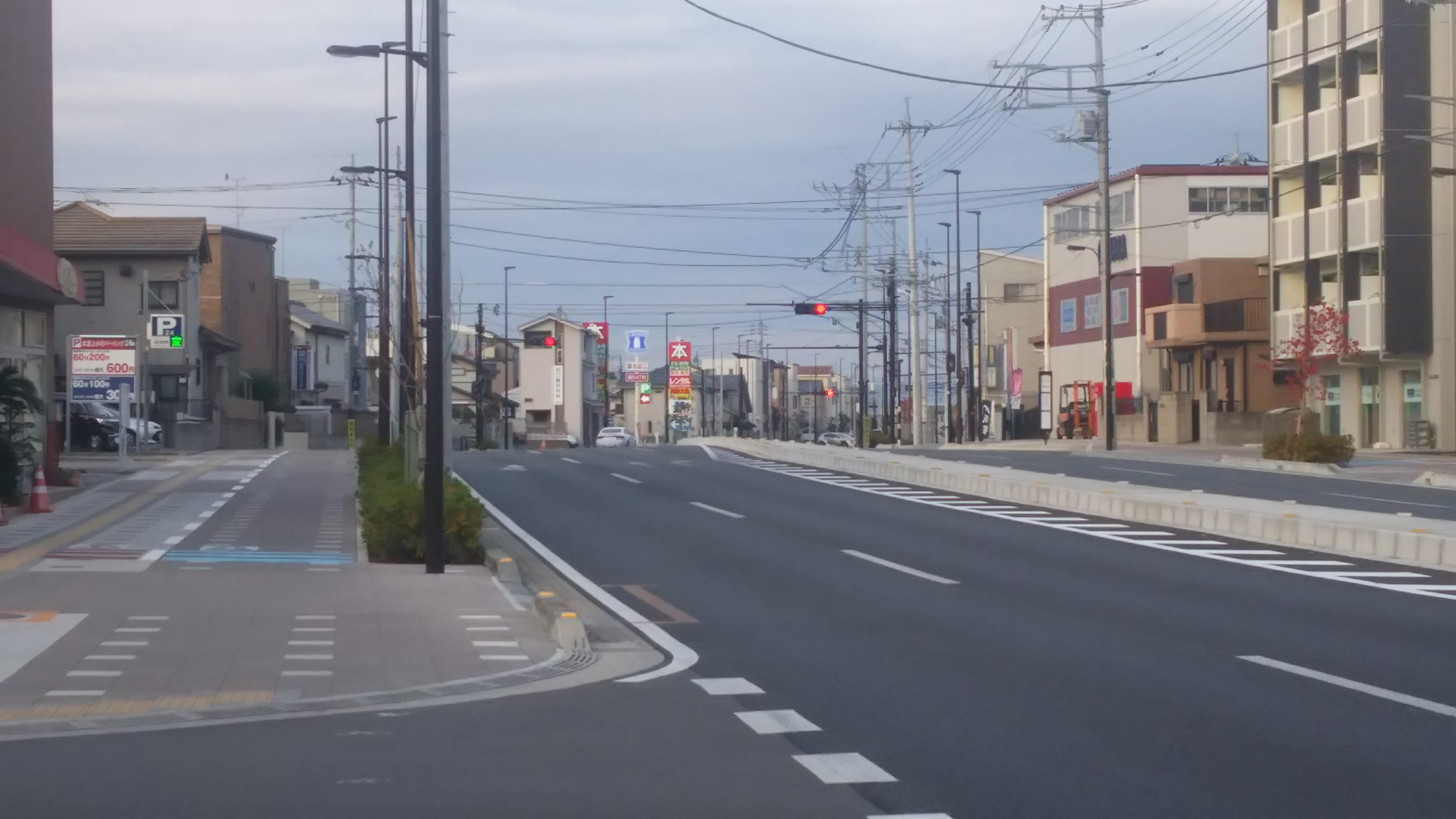 2018年12月撮影